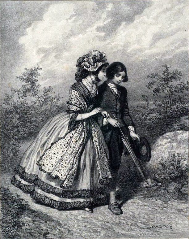 La Jeunesse de Jean-Jacques Rousseau, no. VI : Rousseau et Madame de Larnage. Lithographie.